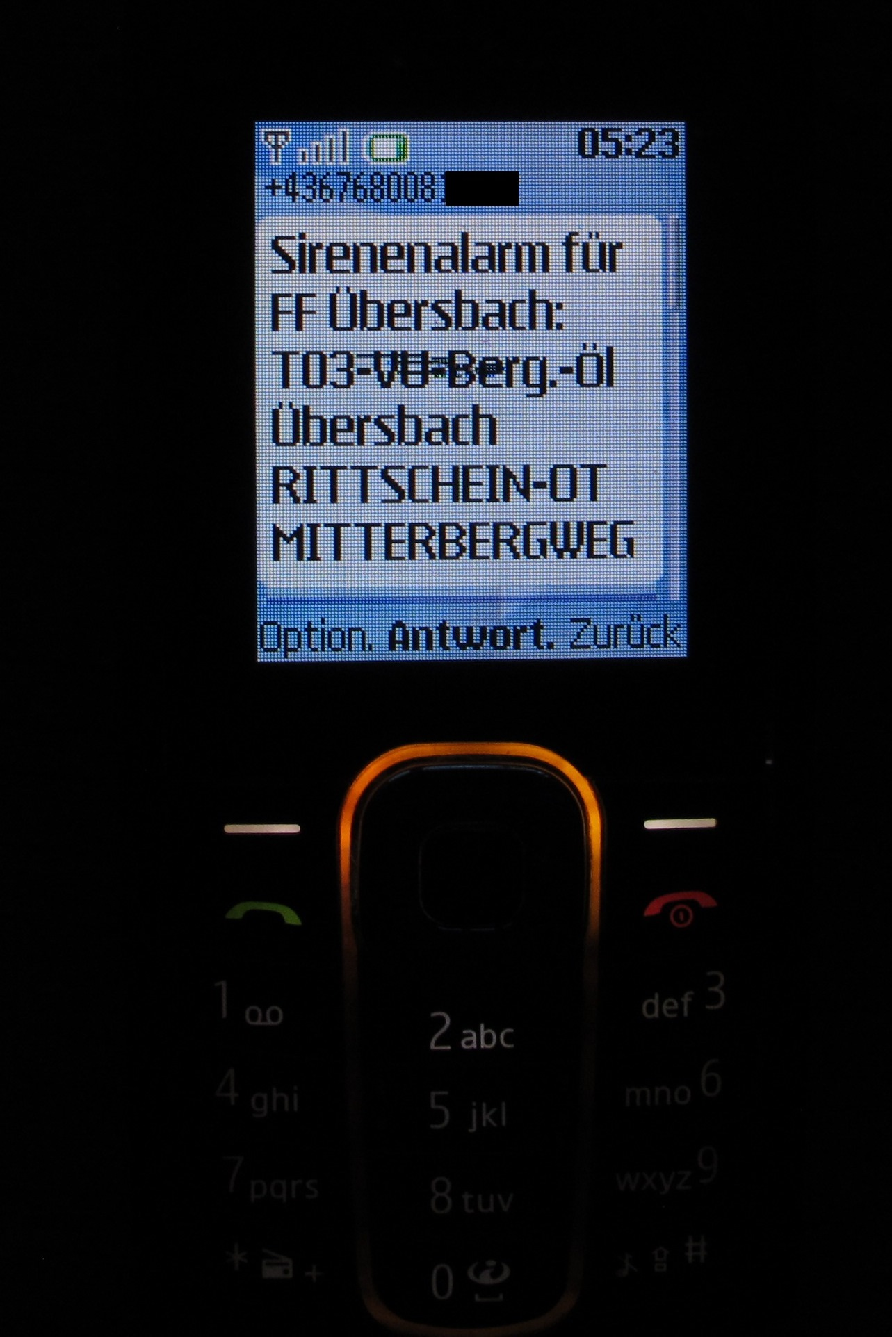 Firefighting Alarmierungs SMS Feuerwehr Short Message Service